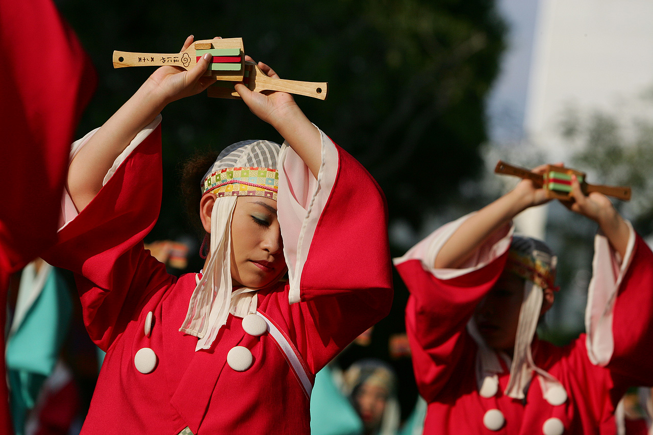 高知よさこい祭り2005